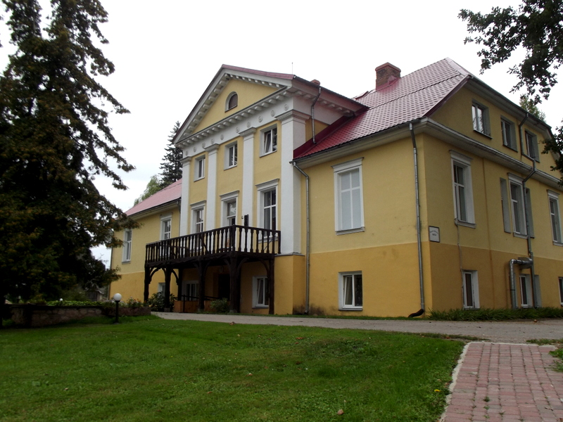 Derpeles muiža